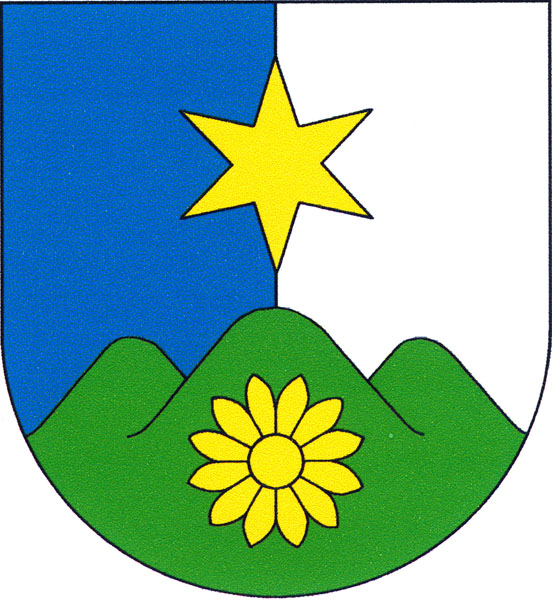 Znak obce Raná